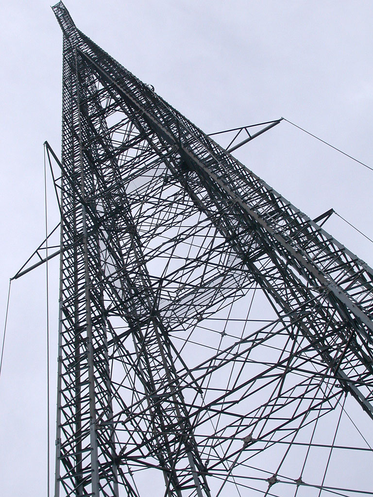 Mellanvågsstation/Mittelwellensender Sölvesborg